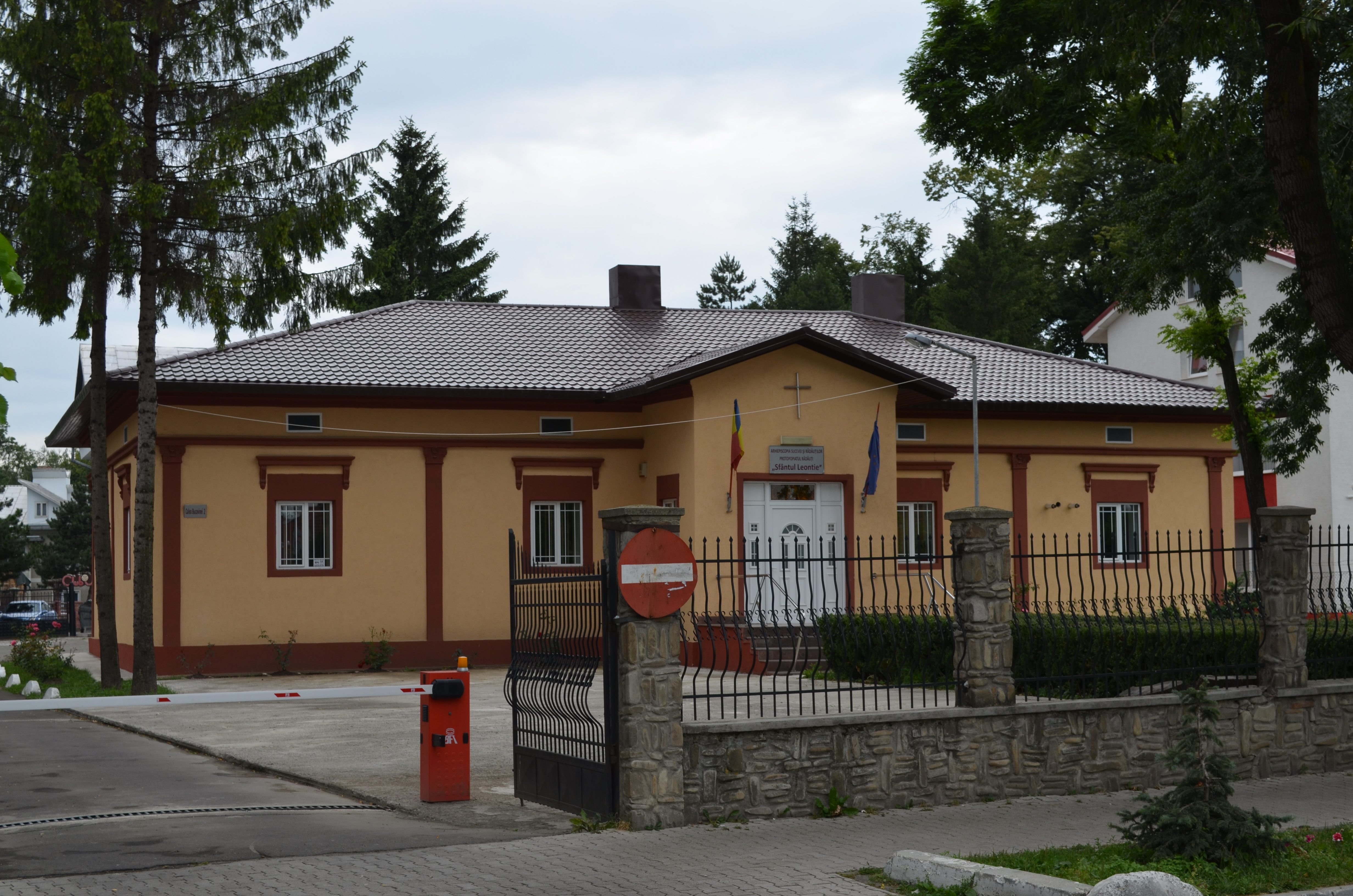 Casa Protopopiatului Rădăuți, Calea Bucovinei nr. 2, Rădăuți